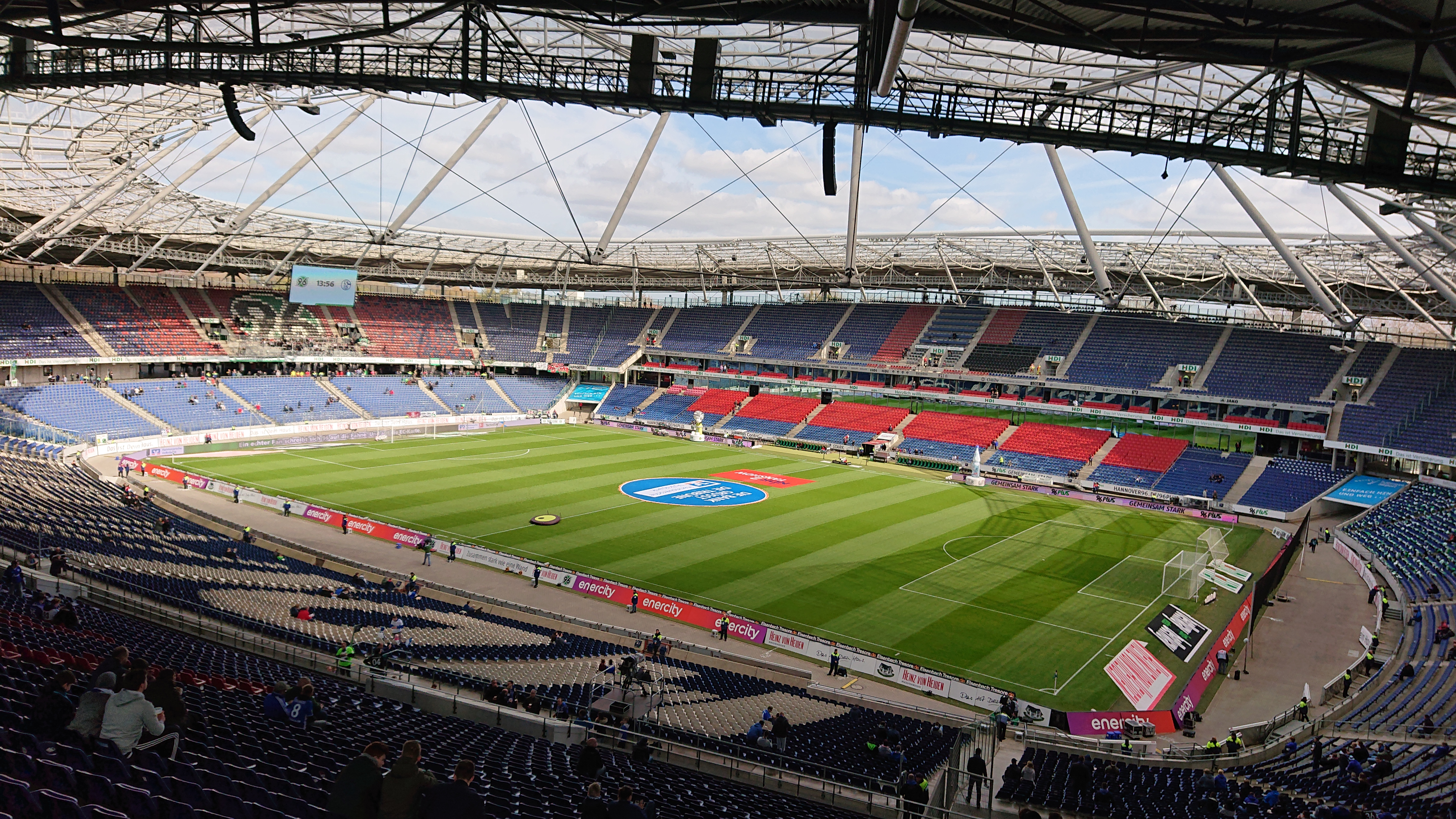 Innenraum der HDI-Arena vor dem Spiel gegen den FC Schalke 04 (2019)